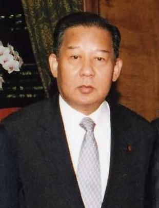 Toshihiro Nikai.